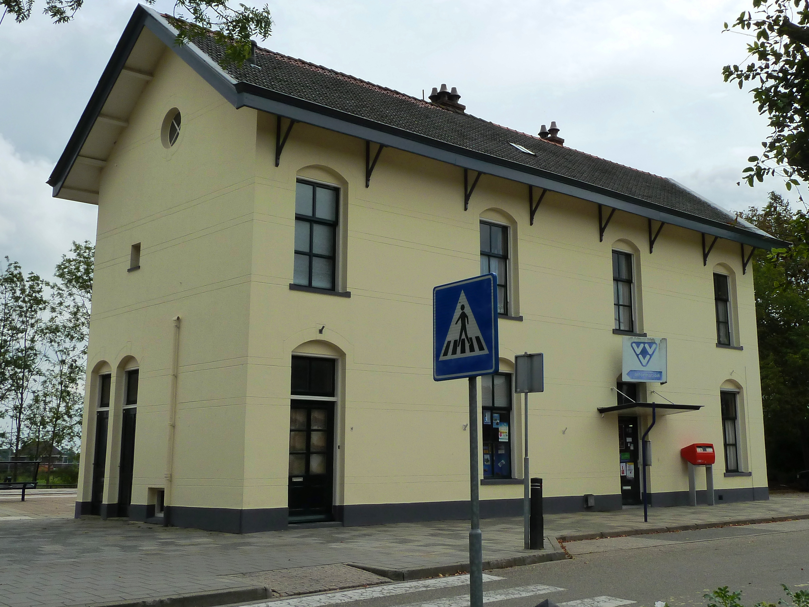 Stationsgebouw van Station Baflo (Baflo, Winsum, Groningen, Nederland).